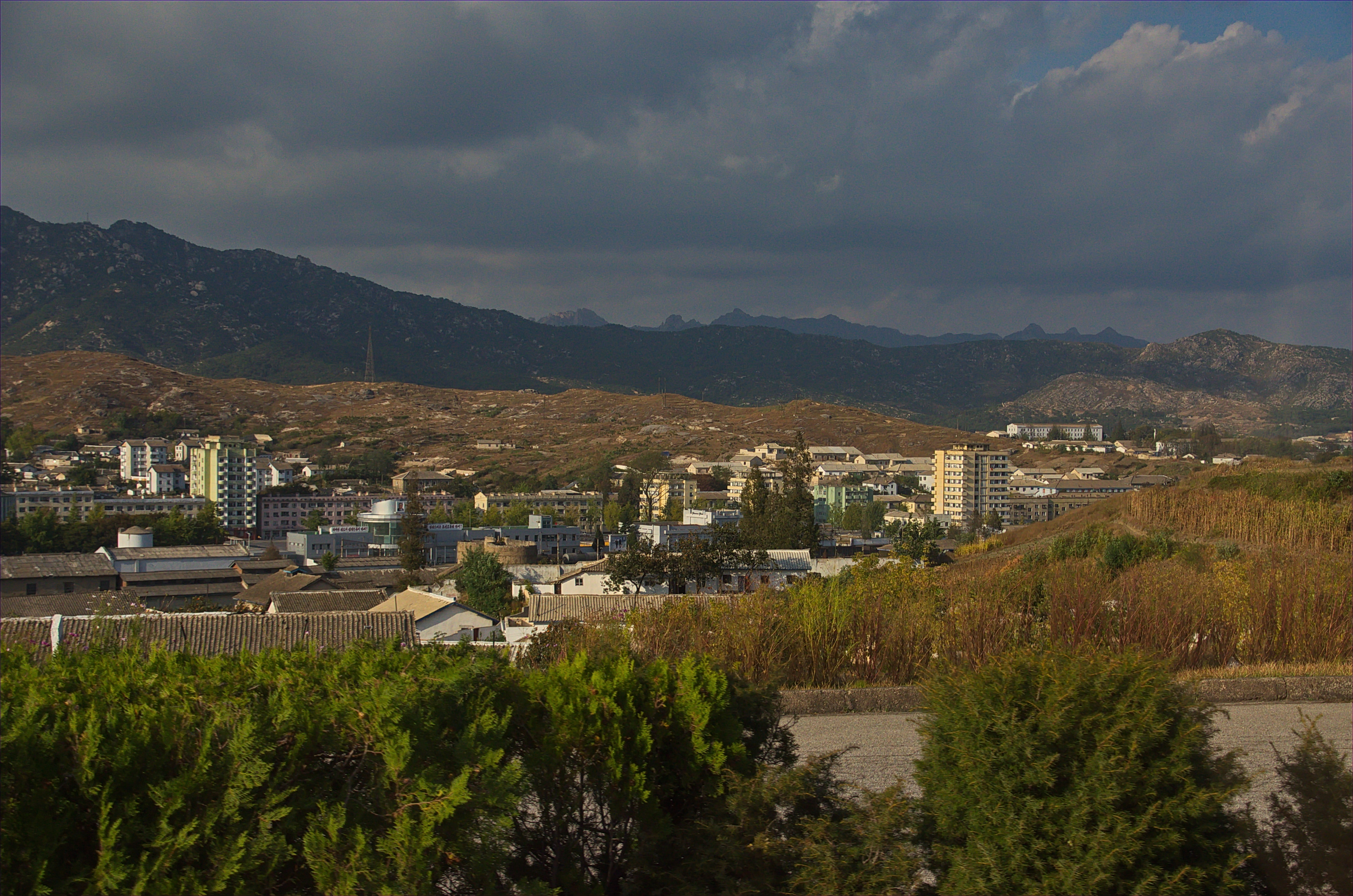 Nordkorea 2015 - von Nampo nach Käsong